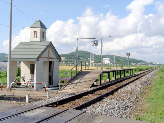 駅風景。 撮影場所 鹿討駅近くの踏切りより